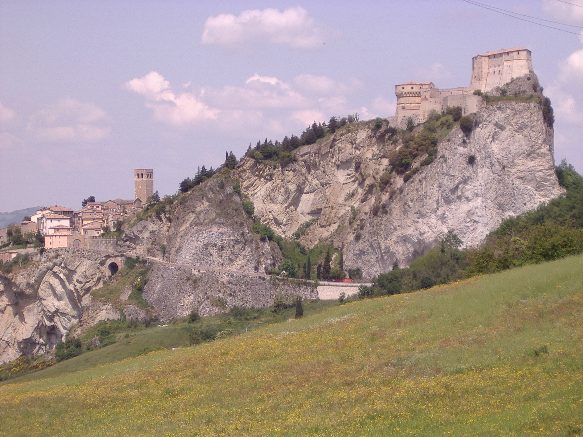 San Leo Forteresse, Emilia-Romagna, Italy